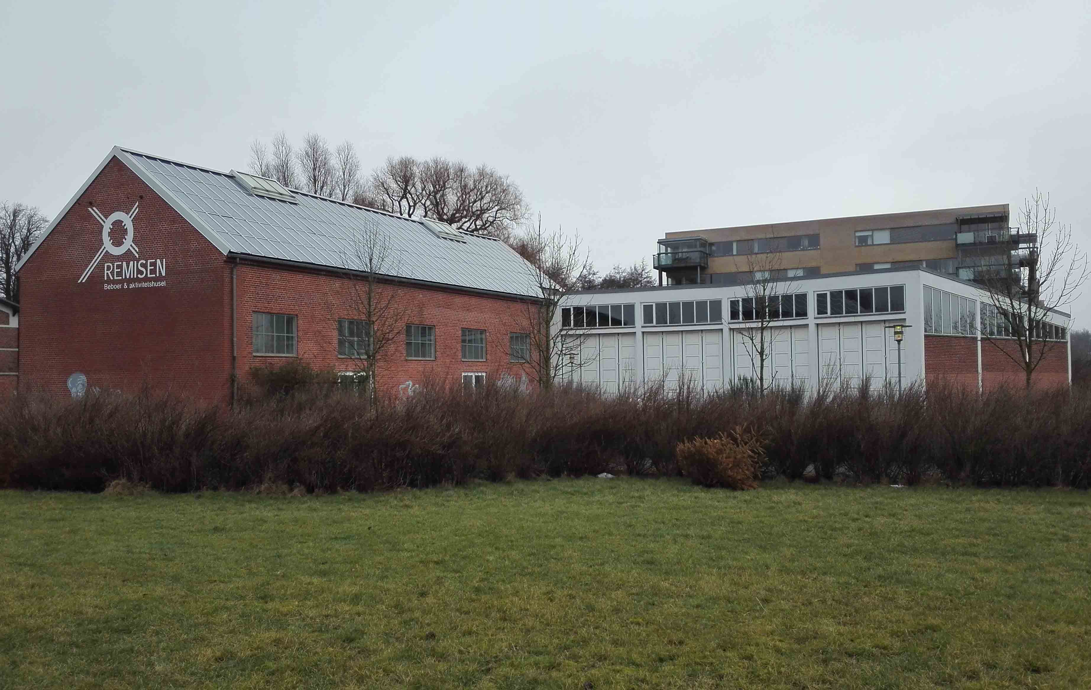 Randers Privatbanestation, dampremise tv., motorremisen th.